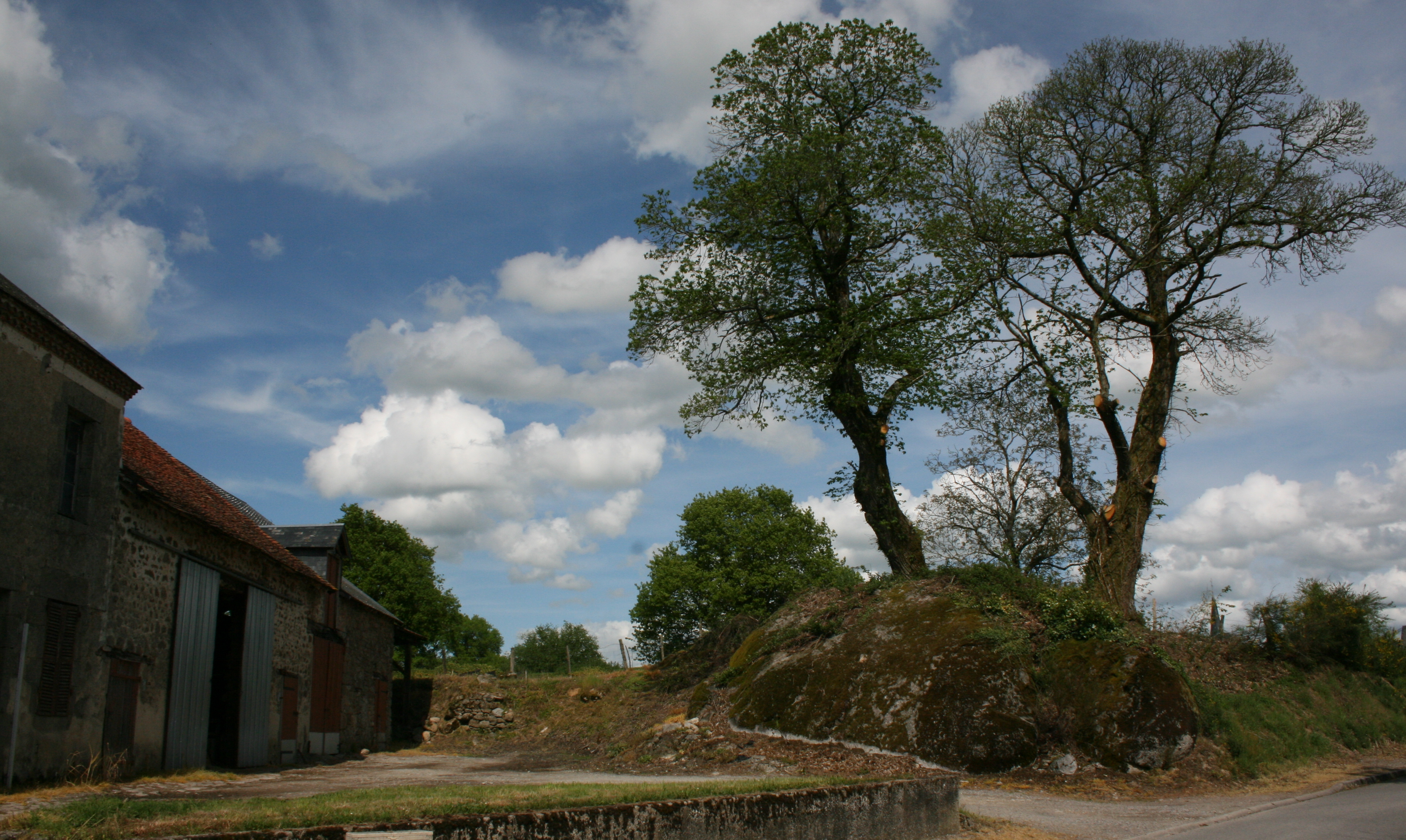 Amas granitique à l'entrée du village de Saint-Hilaire-laTreille,en arrivant de Dompierre les églises.